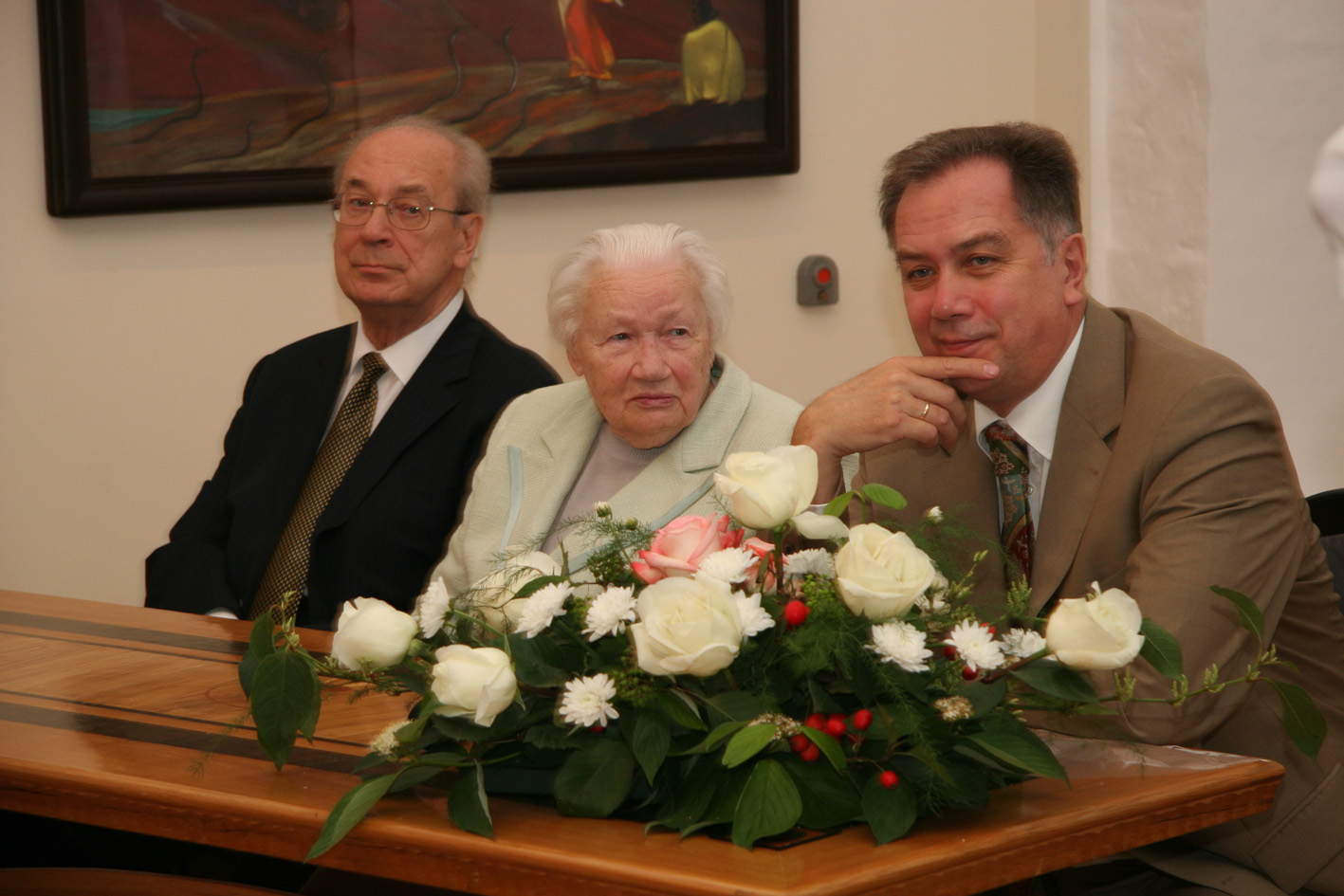 Ю. М. Воронцов, дипломат, постоянный представитель России при ООН, Чрезвычайный и Полномочный Посол, Президент Международного Центра Рерихов; Л.В.Шапошникова, академик РАЕН, РАКЦ и РЭА, заслуженый деятель искусст Российской Федерации, Генеральный директор музея имени Н.К.Рериха; А. С. Соколов, министр культуры и массовых коммуникаций Российской Федерации; Церемония вручение Л.В.Шапошниковой Ордена Дружбы.